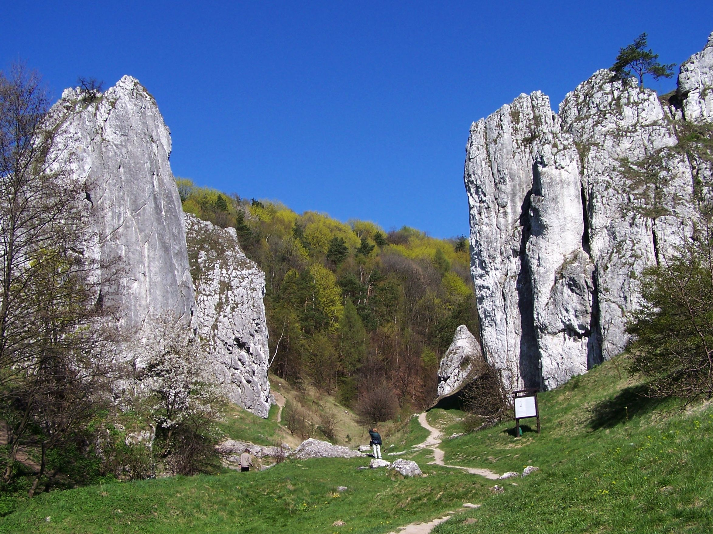 Dolina Bolechowicka (Dolinki Krakowskie)